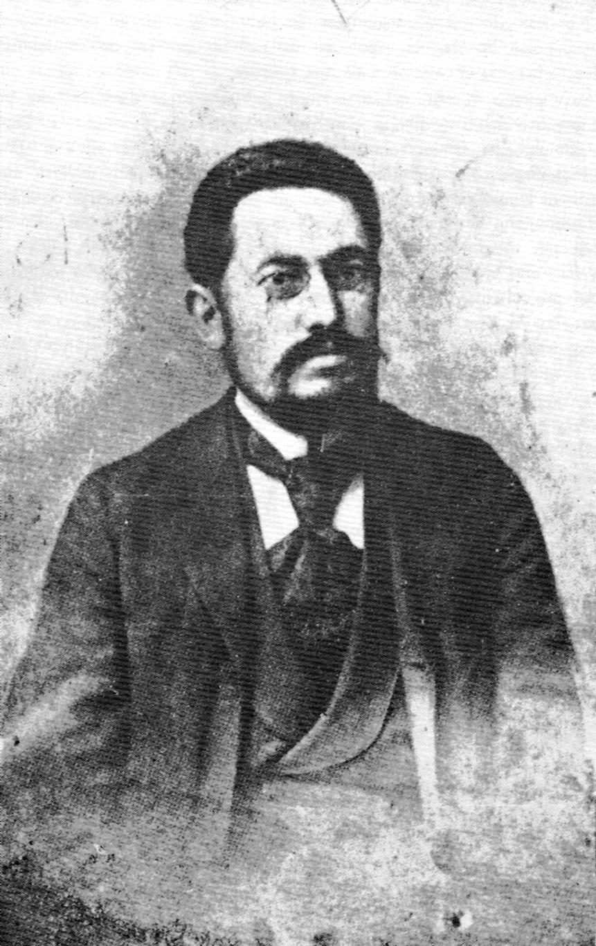 Michele Gerardo Pasquarelli